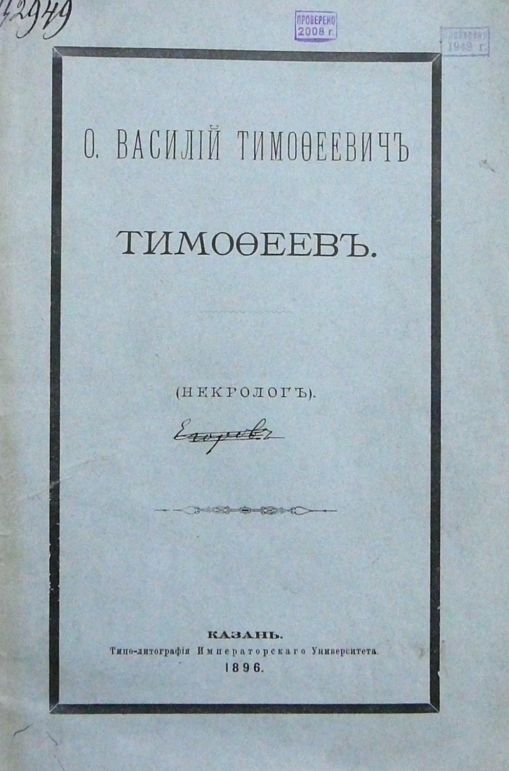 Обложка брошюры: О. Василий Тимофеевич Тимофеев. (Некролог)// Отдельный оттиск из журнала «Православный Собеседник» за 1896 год. — Казань: Типо-литография Императорского Университета, 1896. — 49 с.